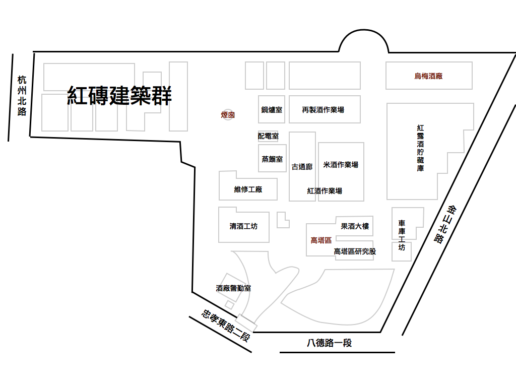 華山1914文化創意產業園區古蹟位置圖，深紅色字體者為華山園區中三大市定古蹟